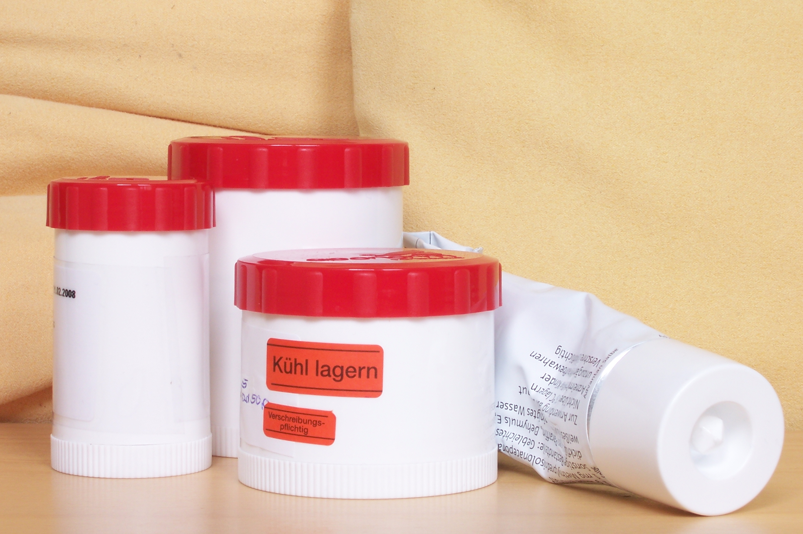 verschiedene Dosen und Tuben mit Salbe